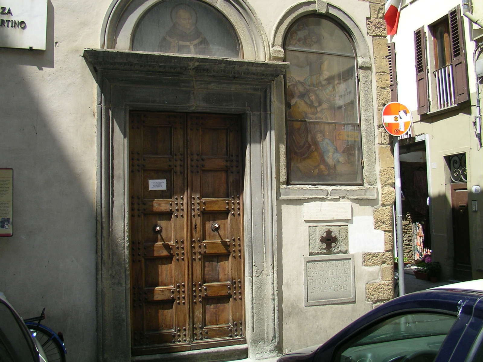 Oratorio Buonomini di San Martino front view in Florence, Italy